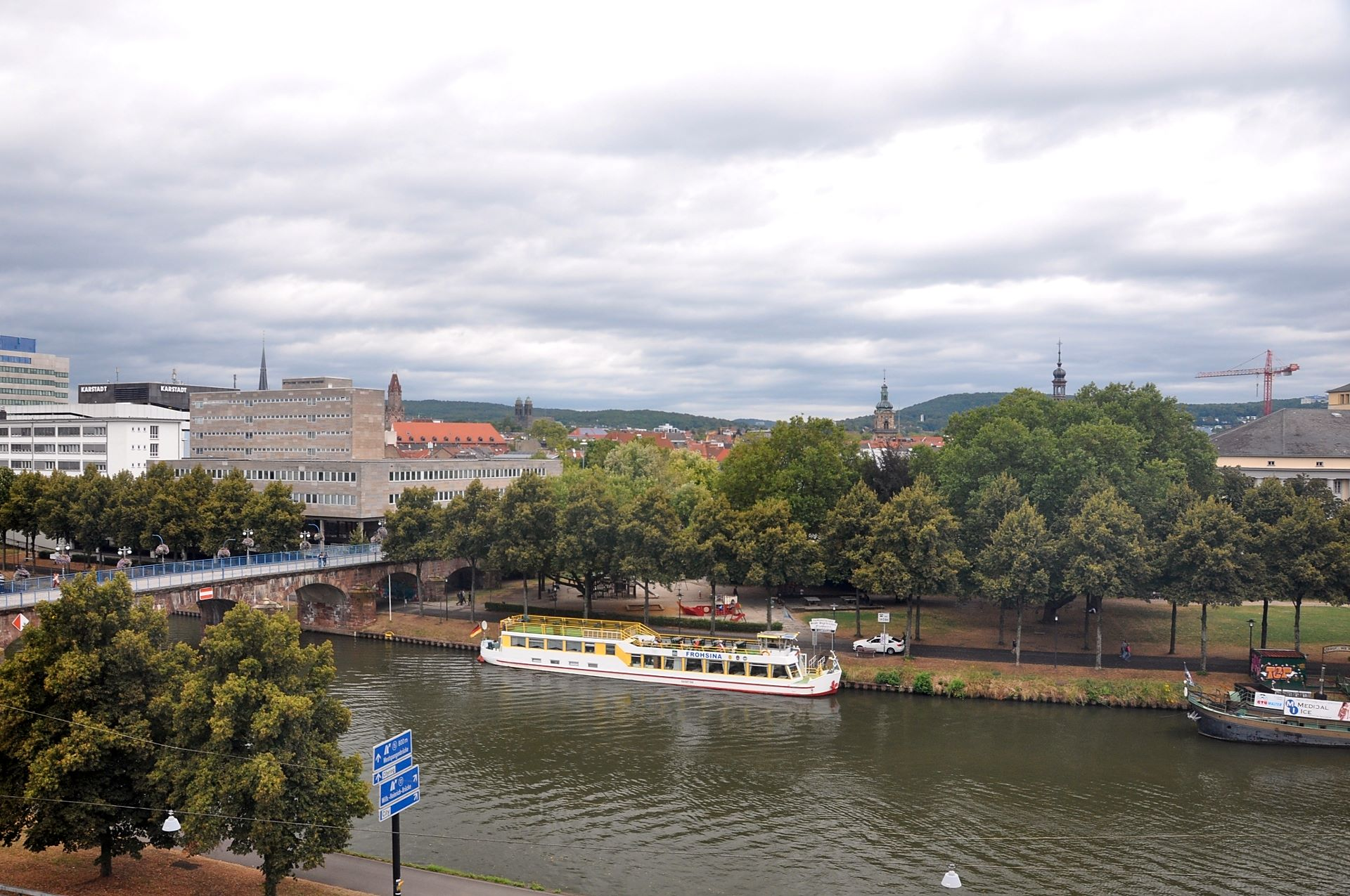 Saarbrücken